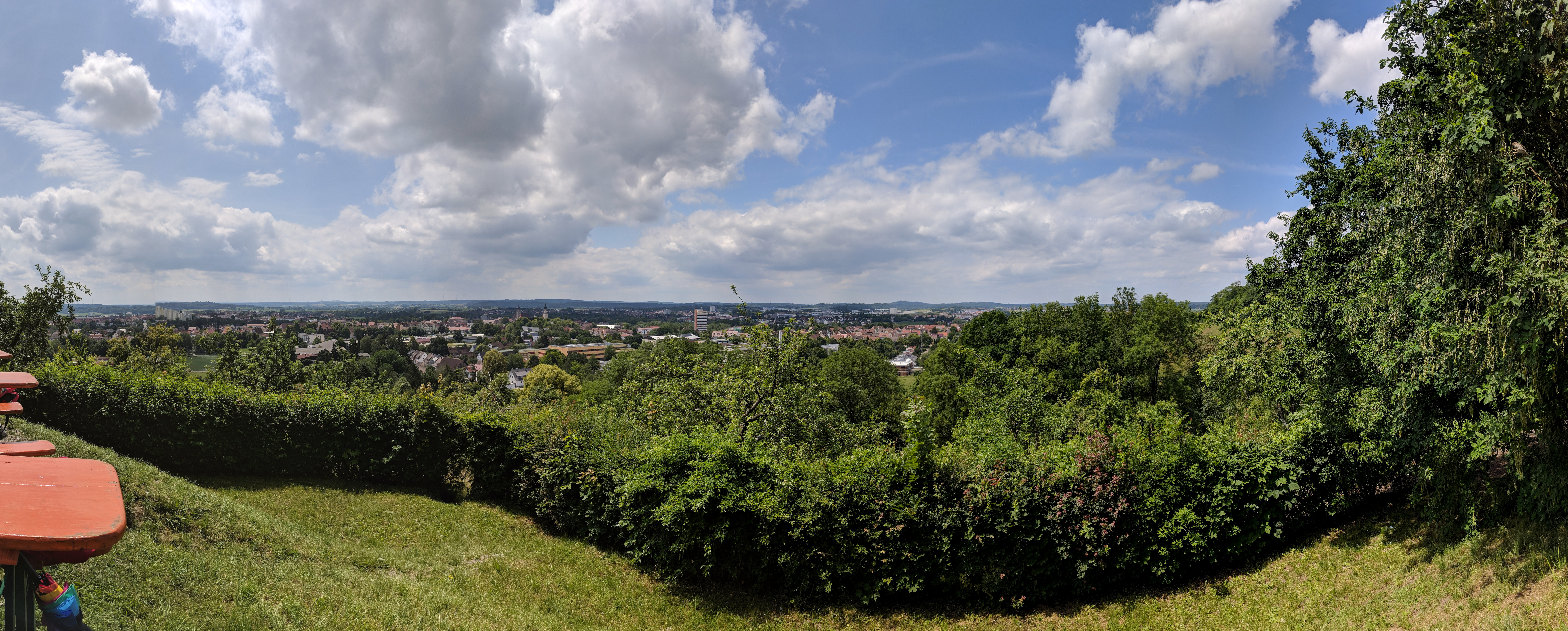 Panoarama von Crailsheim, aufgenommen vom Kräckelberg aus dem Biergarten der „Villa“.